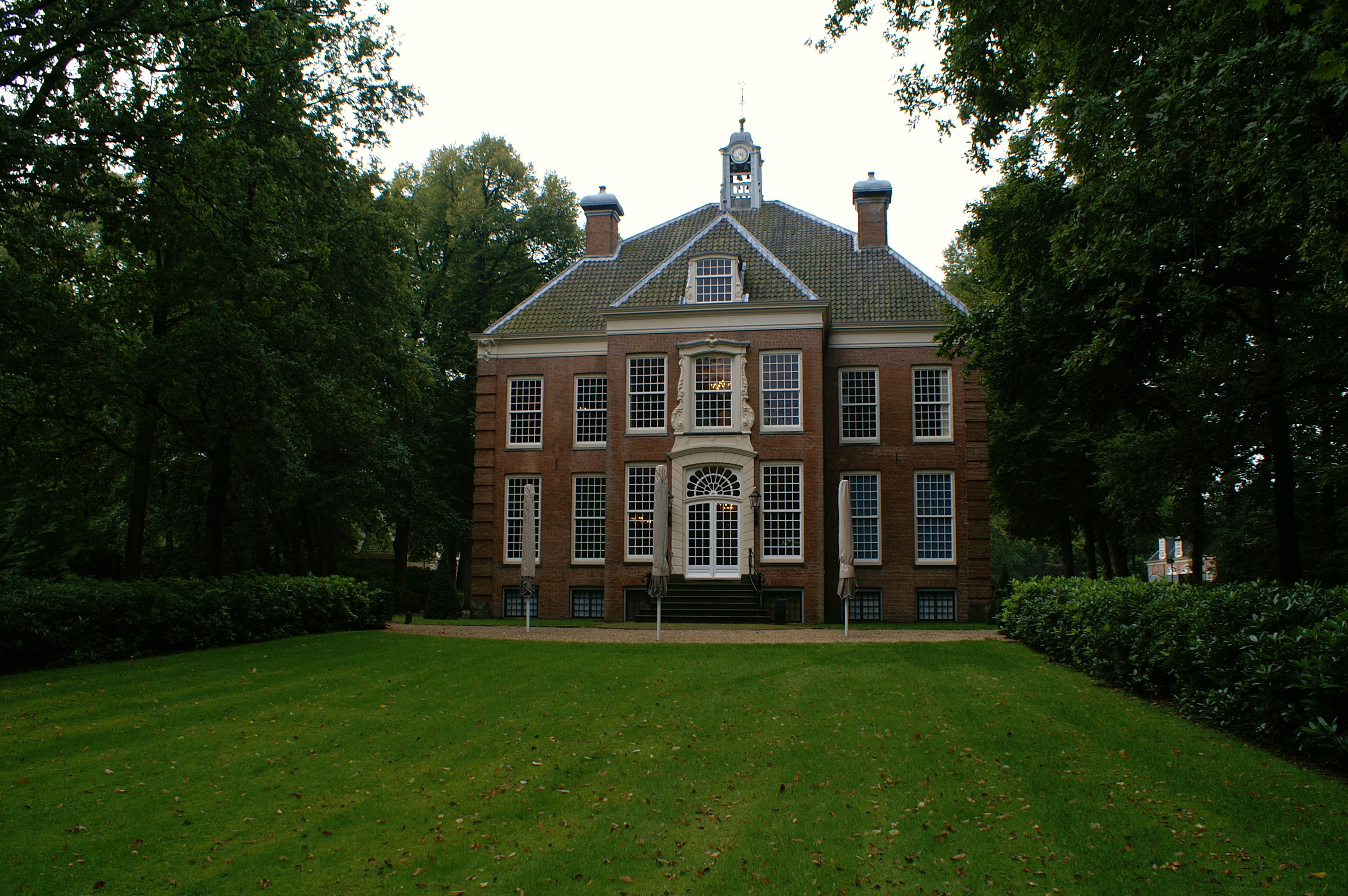 Huize Sparrendaal te Driebergen-Rijsenburg.